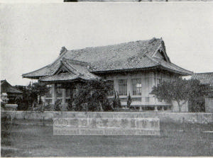 竹南武德殿